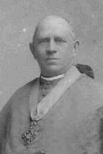 Josef Kyselka (1846 - 1911), Český katolický kněz, učitel a spisovatel.